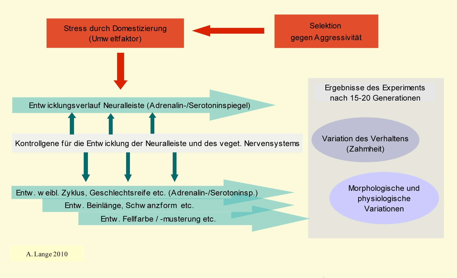 Belyaev Silberfuchs-Experiment